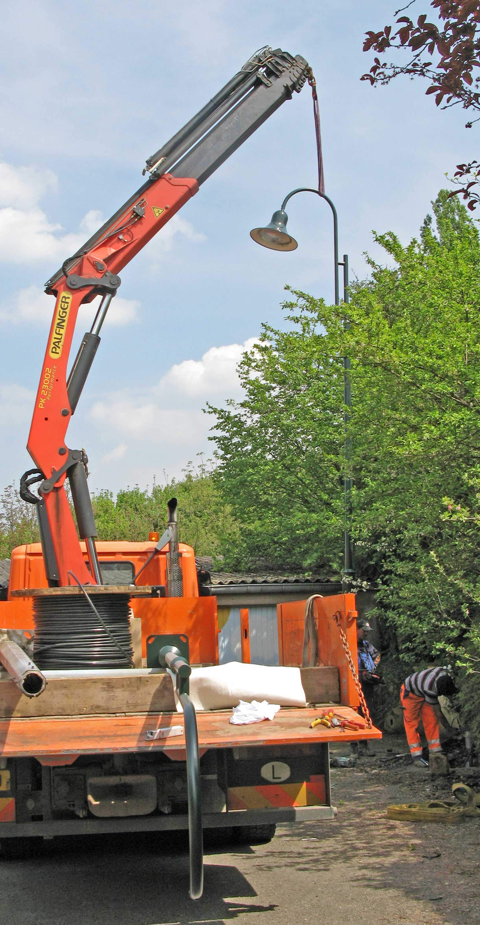 E Palfinger an der Luucht.